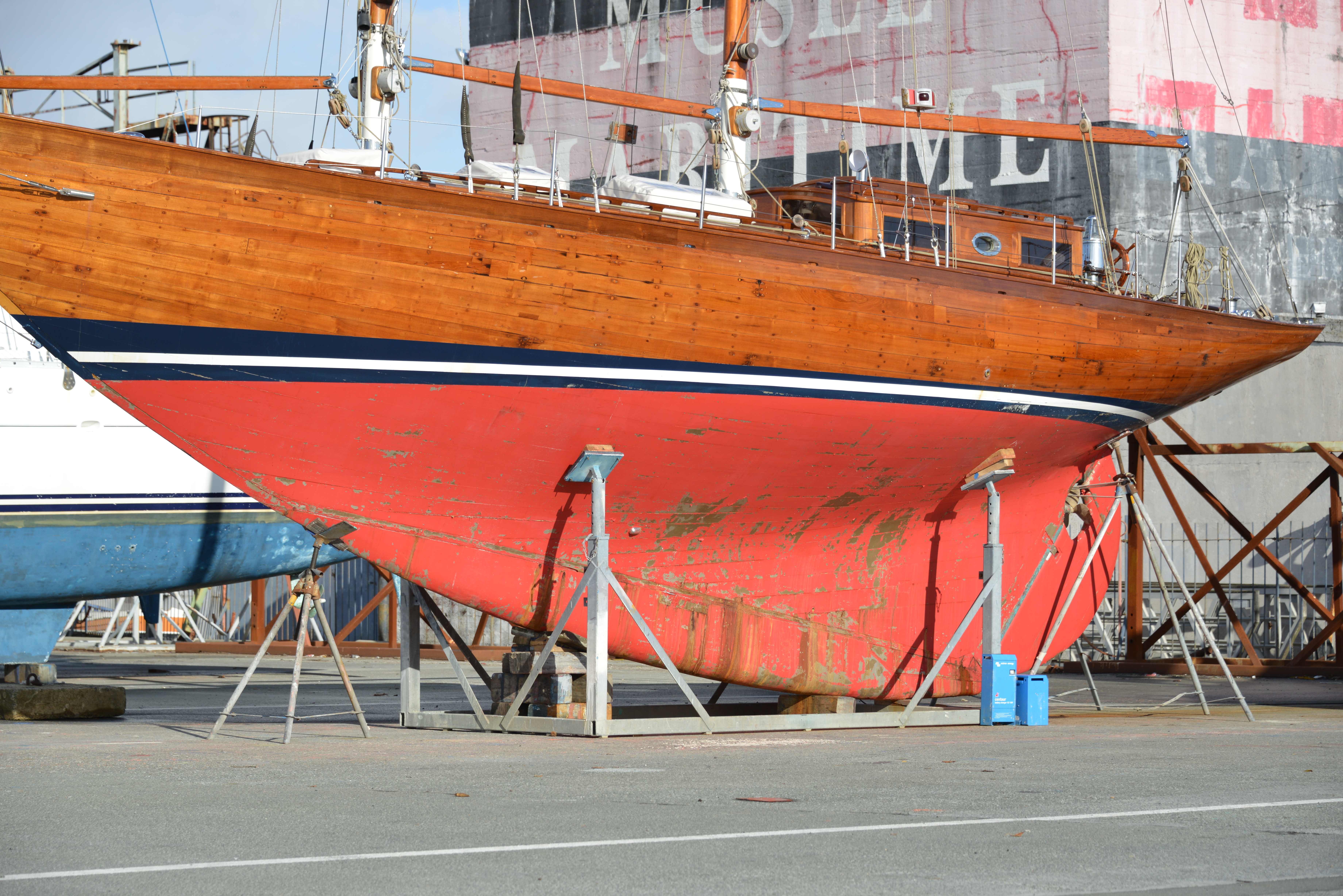 La goélette "La Gaillarde" ,sur ber, sur le plateau nautique de la Ville en Bois. Ce bateau de plaisance en teck a été construit par le chantier naval Abeking & Rasmussen à Brême (Allemagne) en 1939. Il mesure 15 mètres de longueur (LHT) et 3,25 mètres de large. A l' origine, c' était un ketch à wisbone. Il possède une quille longue. Quartier d' immatriculation: La Rochelle. Numéro d' imatriculation: 167304. Anciens noms: "Drei Schwestern" de 1939 à 1946 et "Nicéphore" de 1946 à 1970. Transformé en goélette en 1984. La Rochelle, Charente Maritime, France.